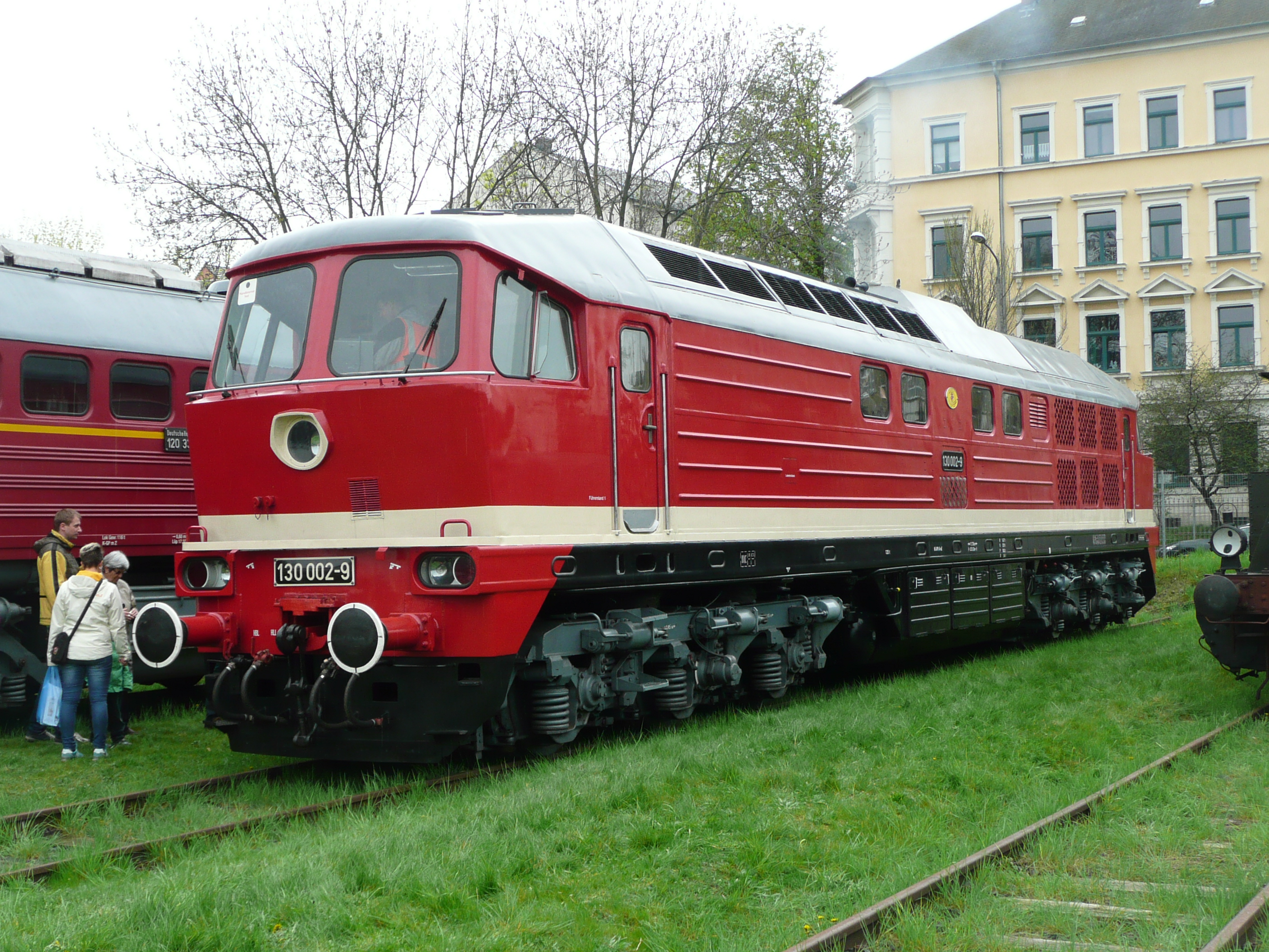 Foto der 130.002 auf dem Dampflokfest Dresden